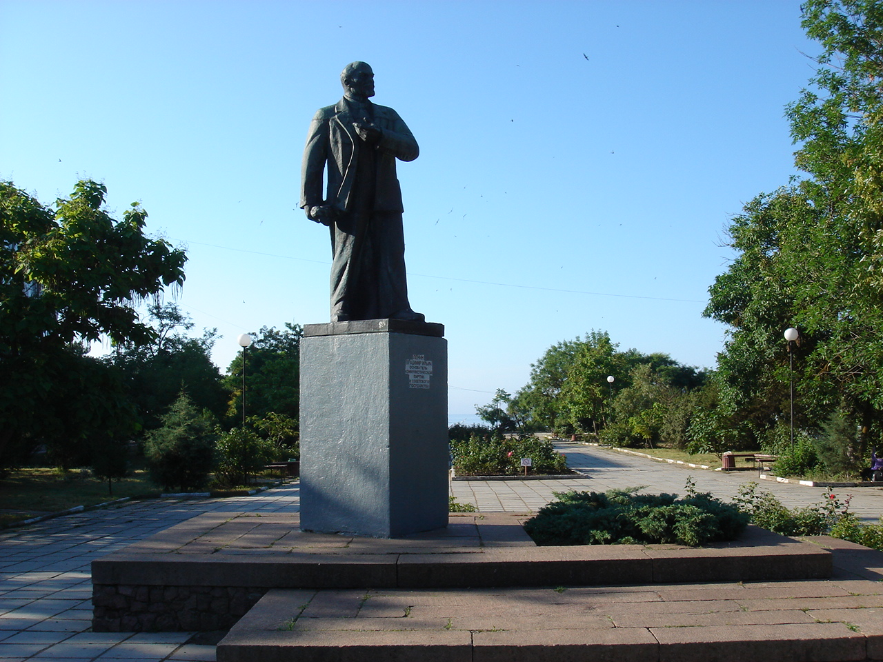 Памятник В.И.Ленину. Дата сооружения: 1966 г.: улица Советская, сквер у Дома культуры, Приморский, Феодосия, Крым This object is located on the Crimean Peninsula and recognized as cultural heritage by both Russia and Ukraine under the monument ID: 8231481000/ 01-116-0066, respectively. The legal status of the Crimean region is currently disputed.